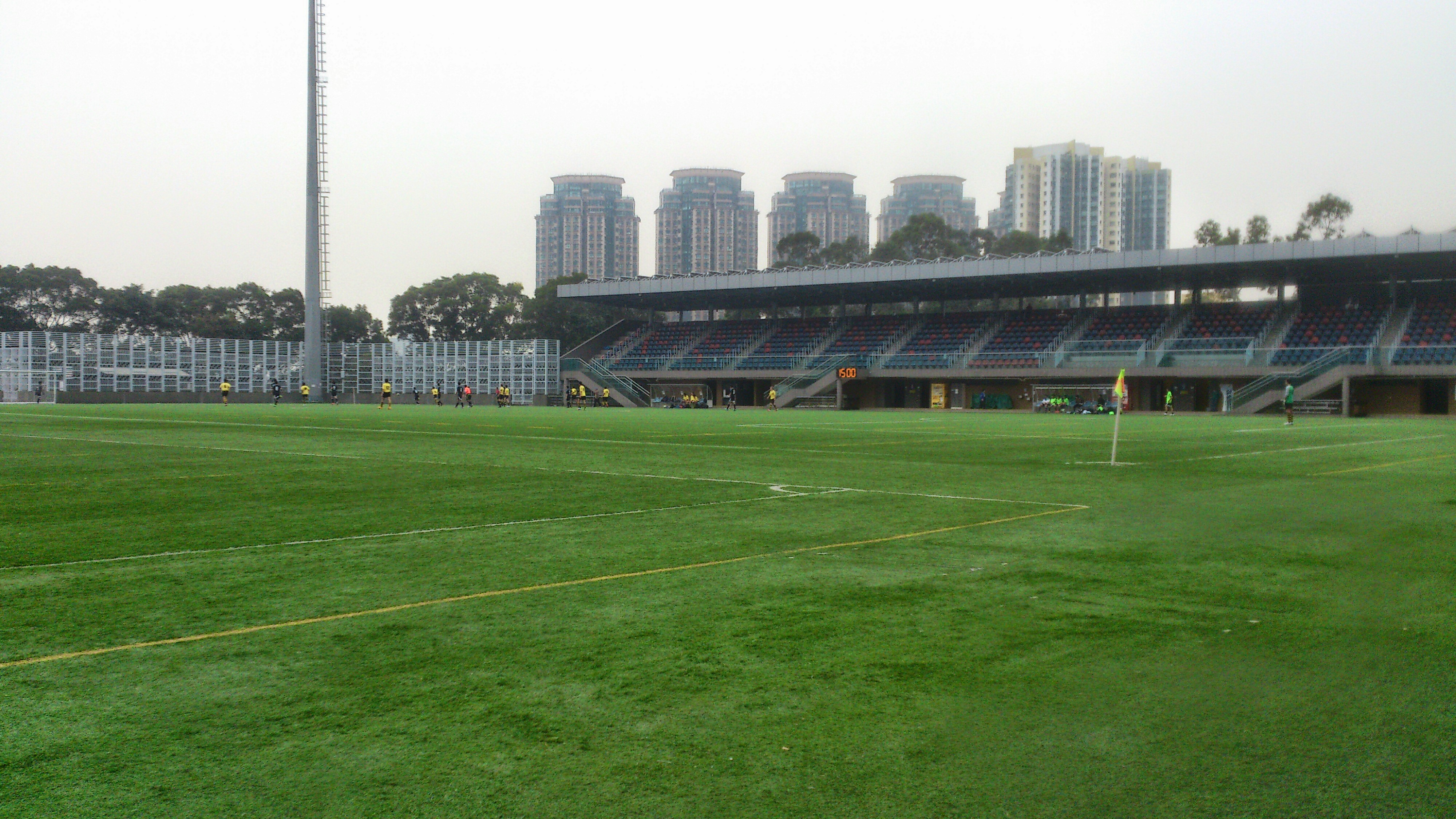 Diamond Hill, Hong Kong